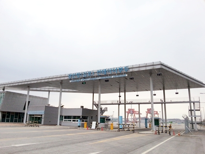 경인항(김포) 컨테이너부두